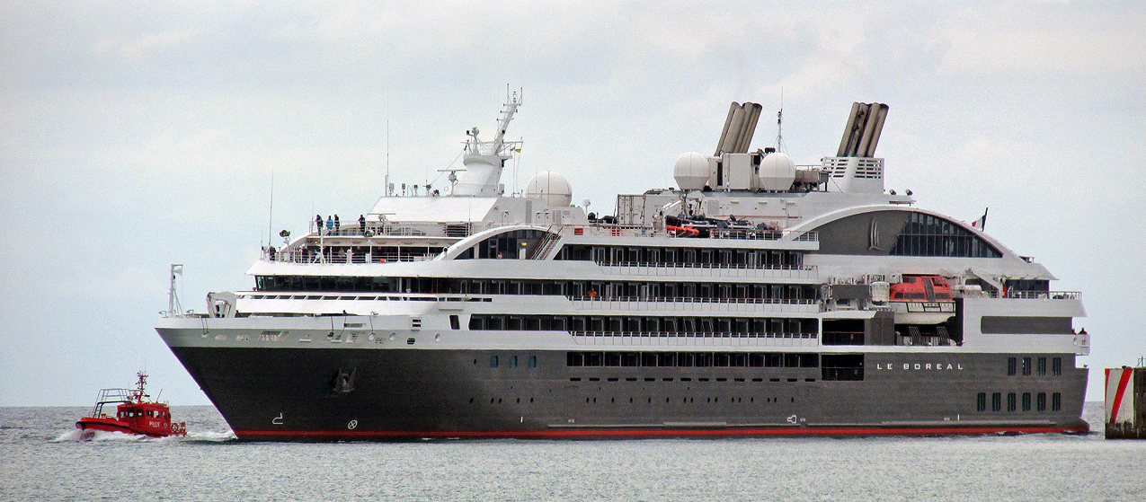 Le Boreal - Ystad 16 juni 2015.